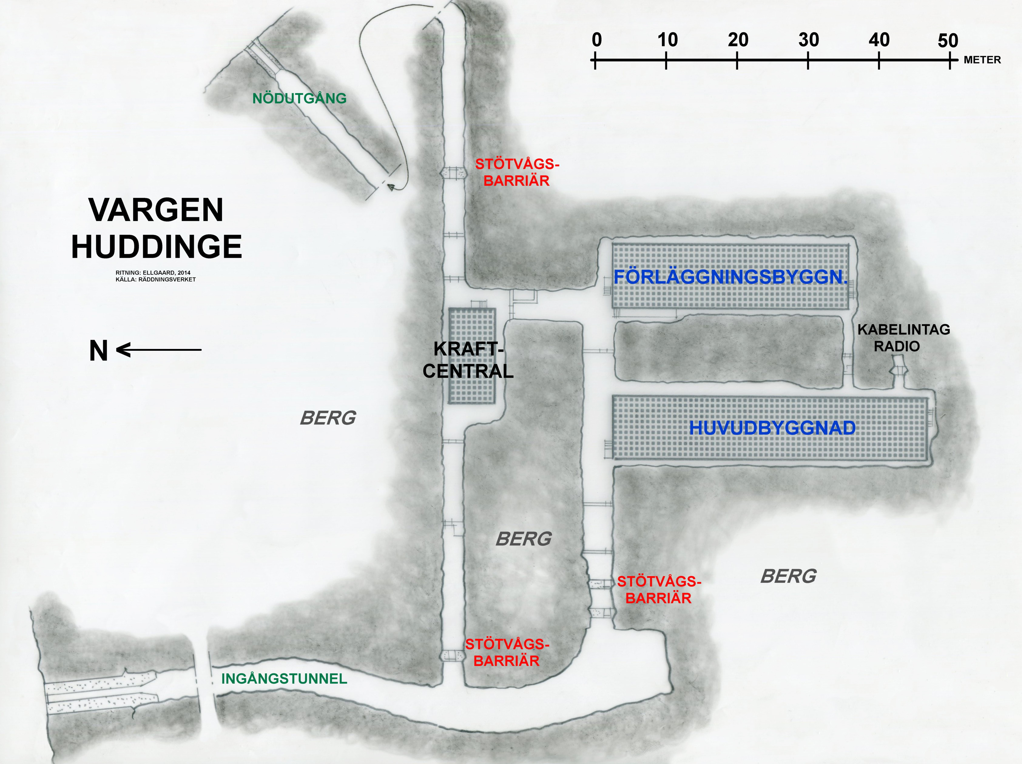 Ledningscentralen "Vargen" i Huddinge, planritning, källa: Räddningsverket